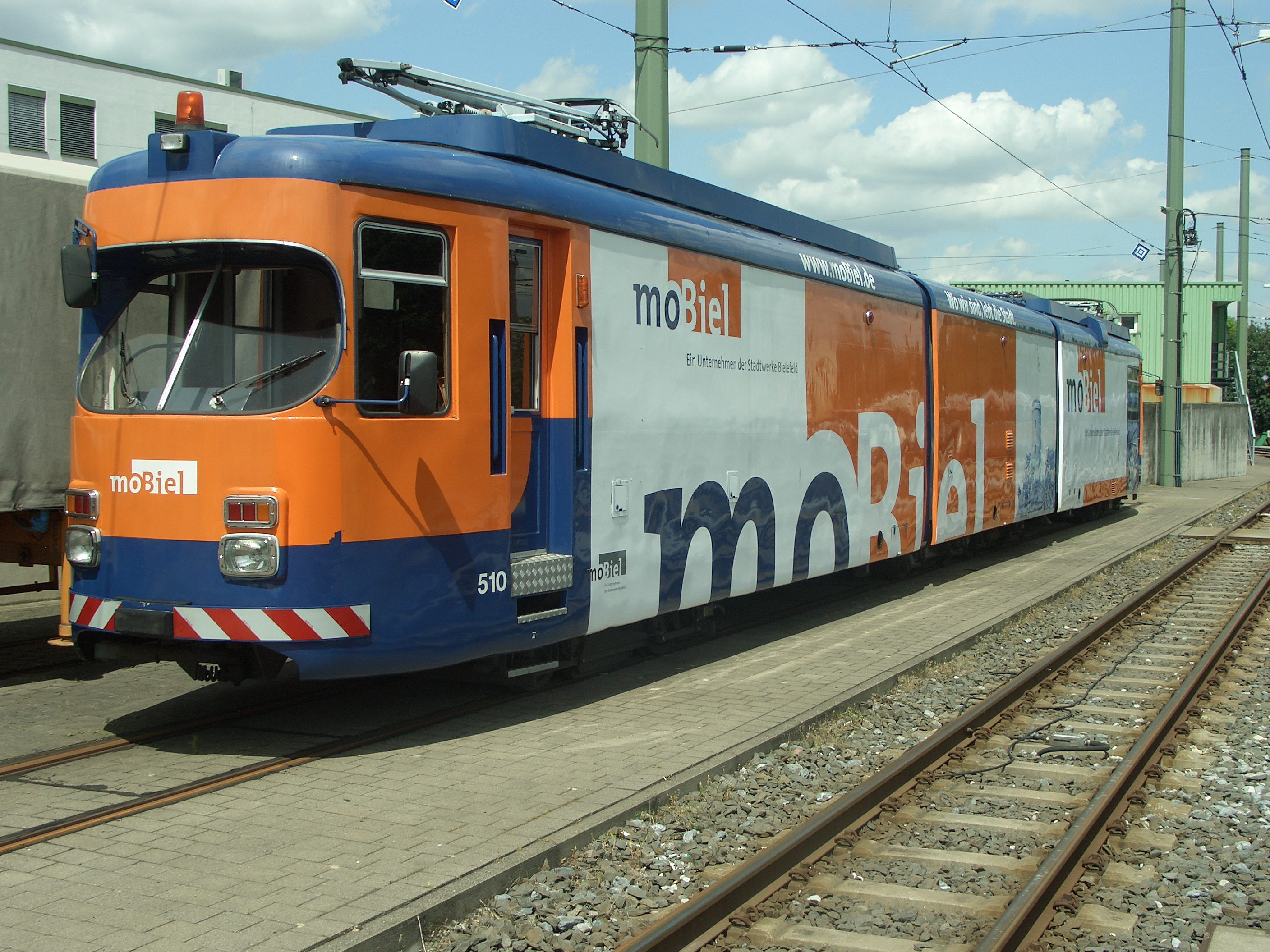 Schienenschleifwagen aus Bielefeld